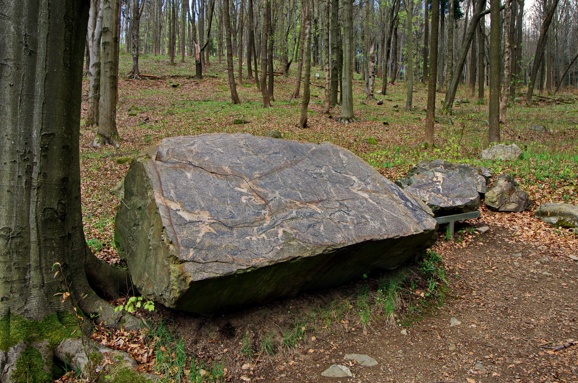 Mariánské Lázně Geopark zastavení č. 9 migmatická rula